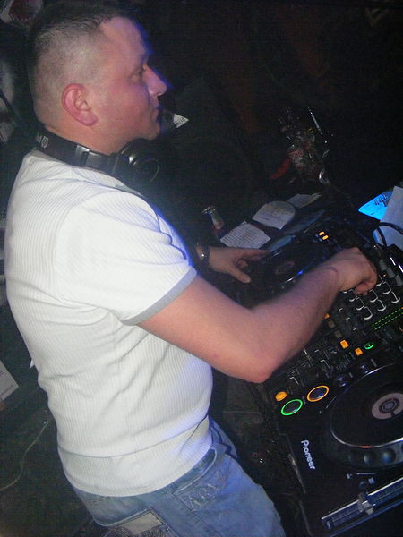 Zdjęcię dj Hazela w klubie Mega Music Wilga